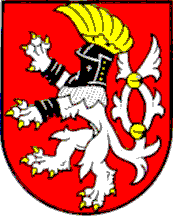 Znak statutárního města Ústí nad Labem